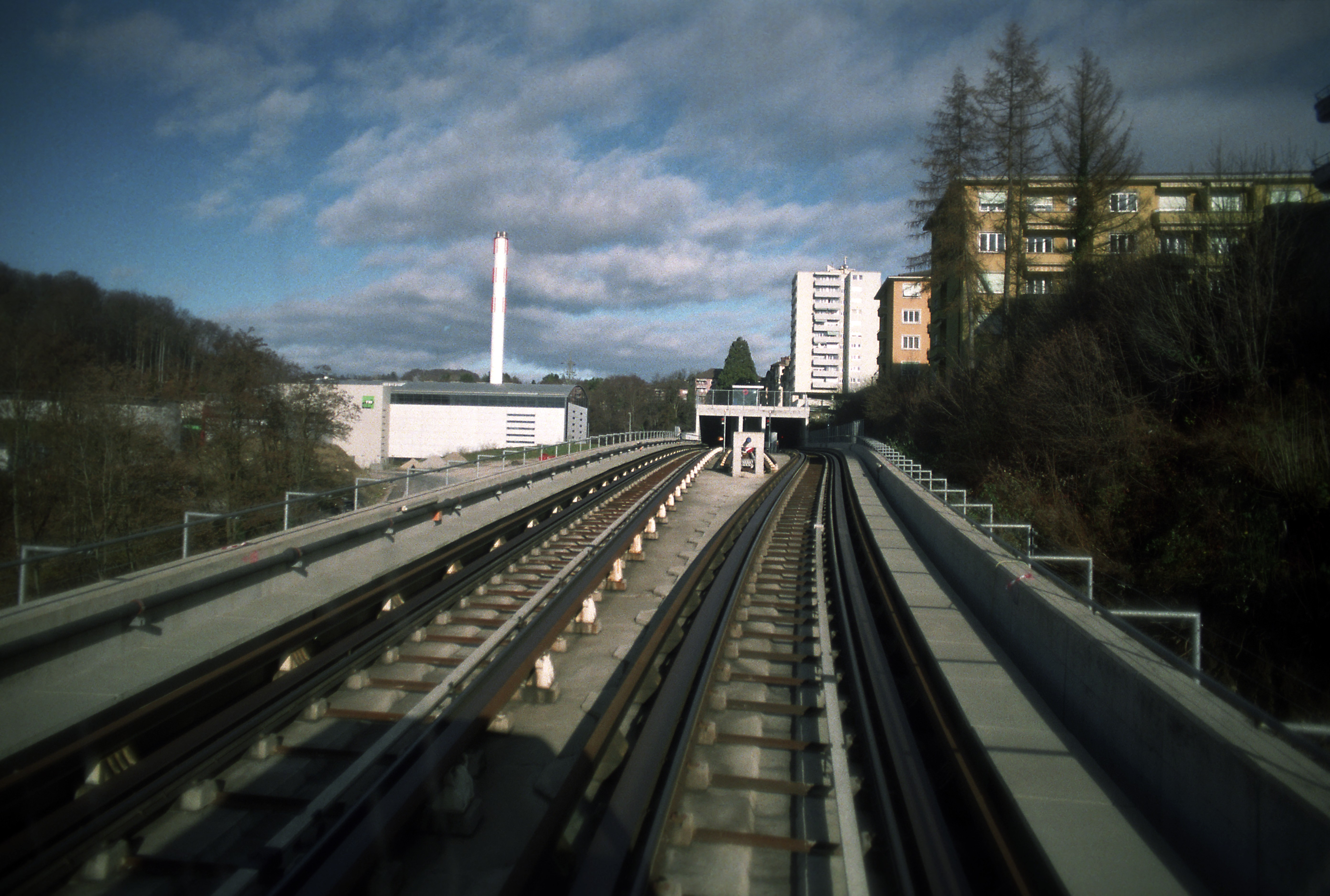 Linie m2 der Metro Lausanne, Streckensicht vor dem Bf Sallaz. Dieser Abschnitt ist das längste Streckenteil unter freiem Himmel, Richtung Croisette.